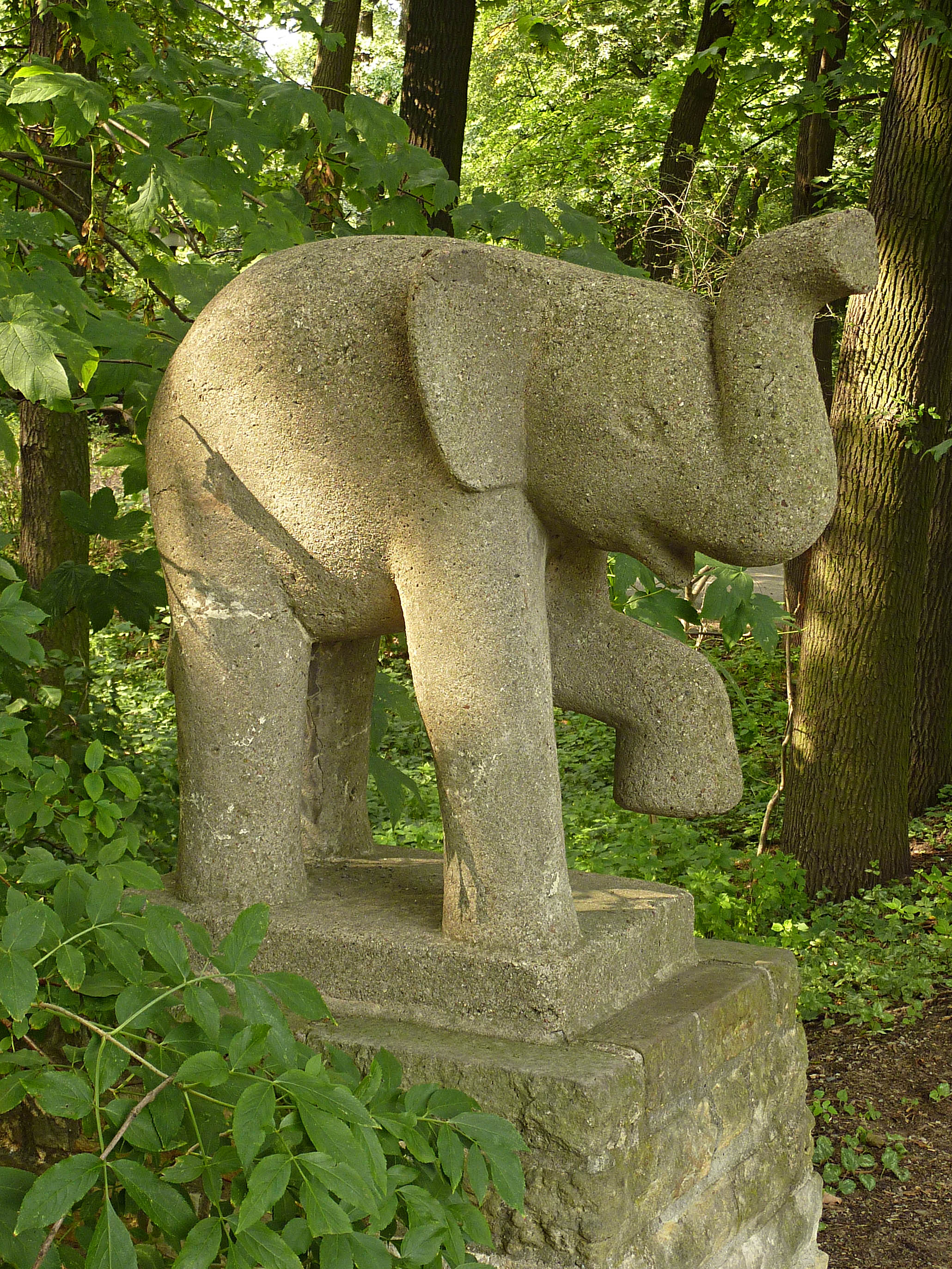 Betonplastik 'Elefant' von Werner Richter aus dem Jahr 1967. Seit 1978 im Tierpark Berlin (Friedrichsfelde). Standort an der Freilichtbühne.